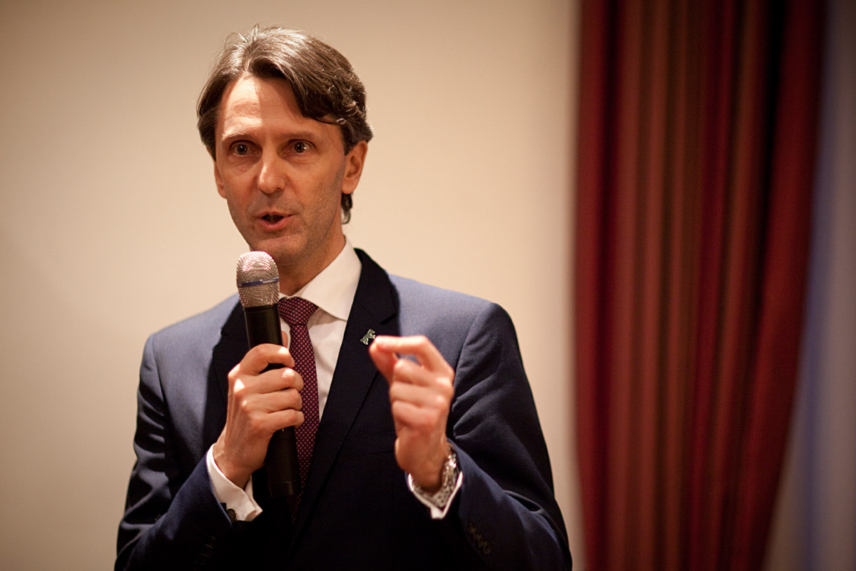 Film-Empfang im Rahmen der Berlinale 2018, Botschaft Berlin